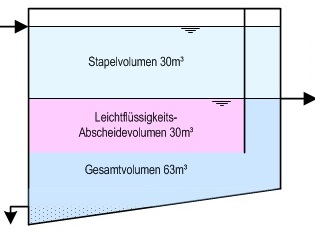 Schema ORB